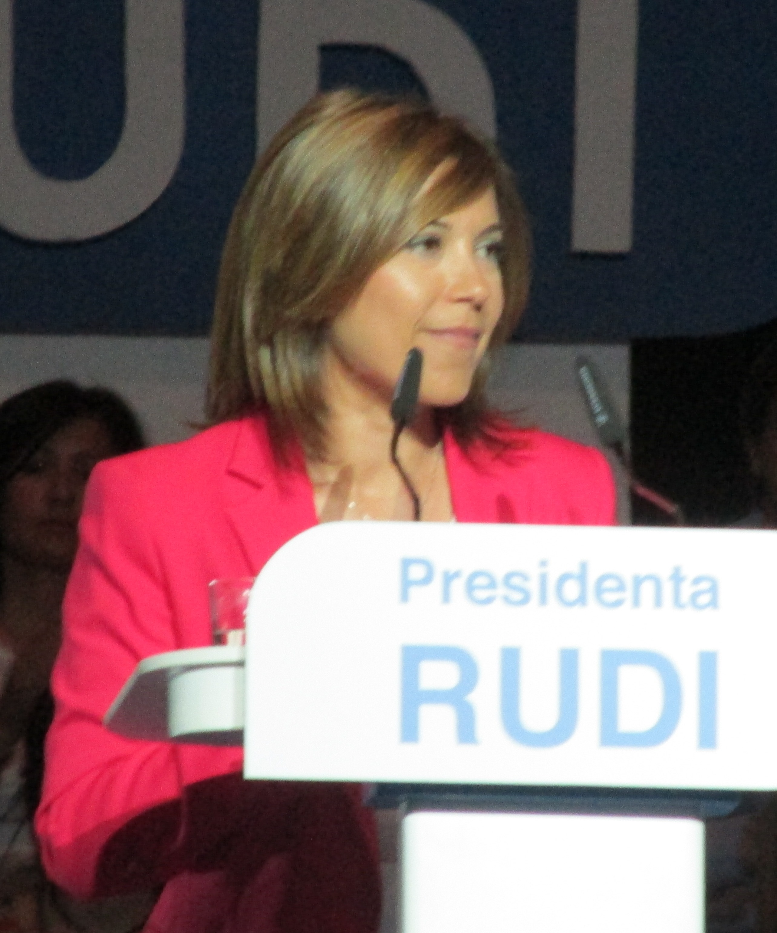 Ana Alos PP Teruel